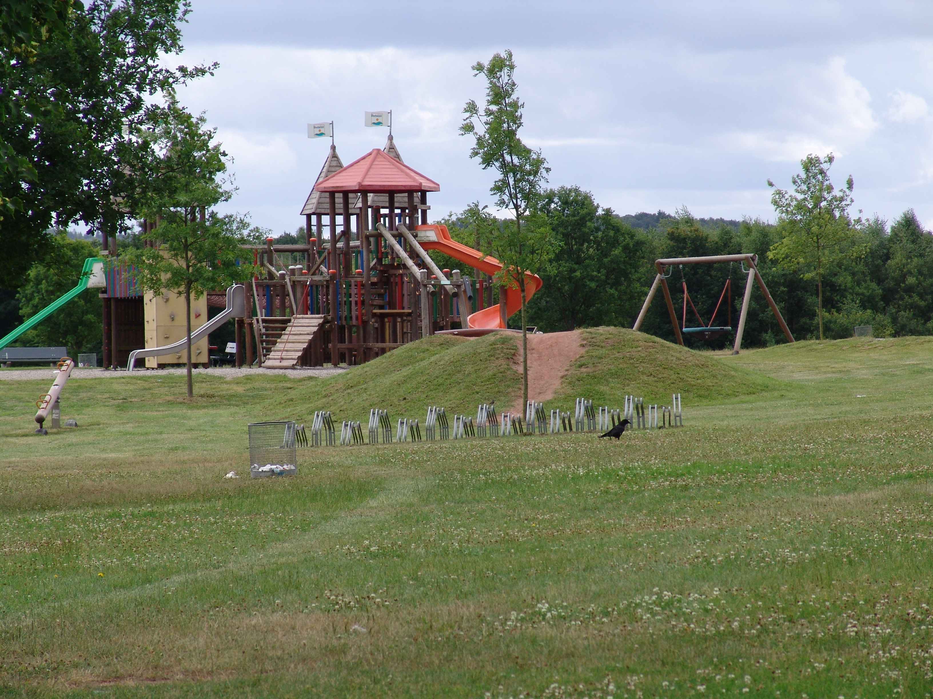 Spielplatz am Bostalsee